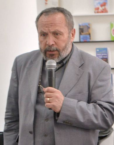 Nichita Danilov în aprilie 2015 la Biblioteca Centrală a BM "B.P.Hasdeu"